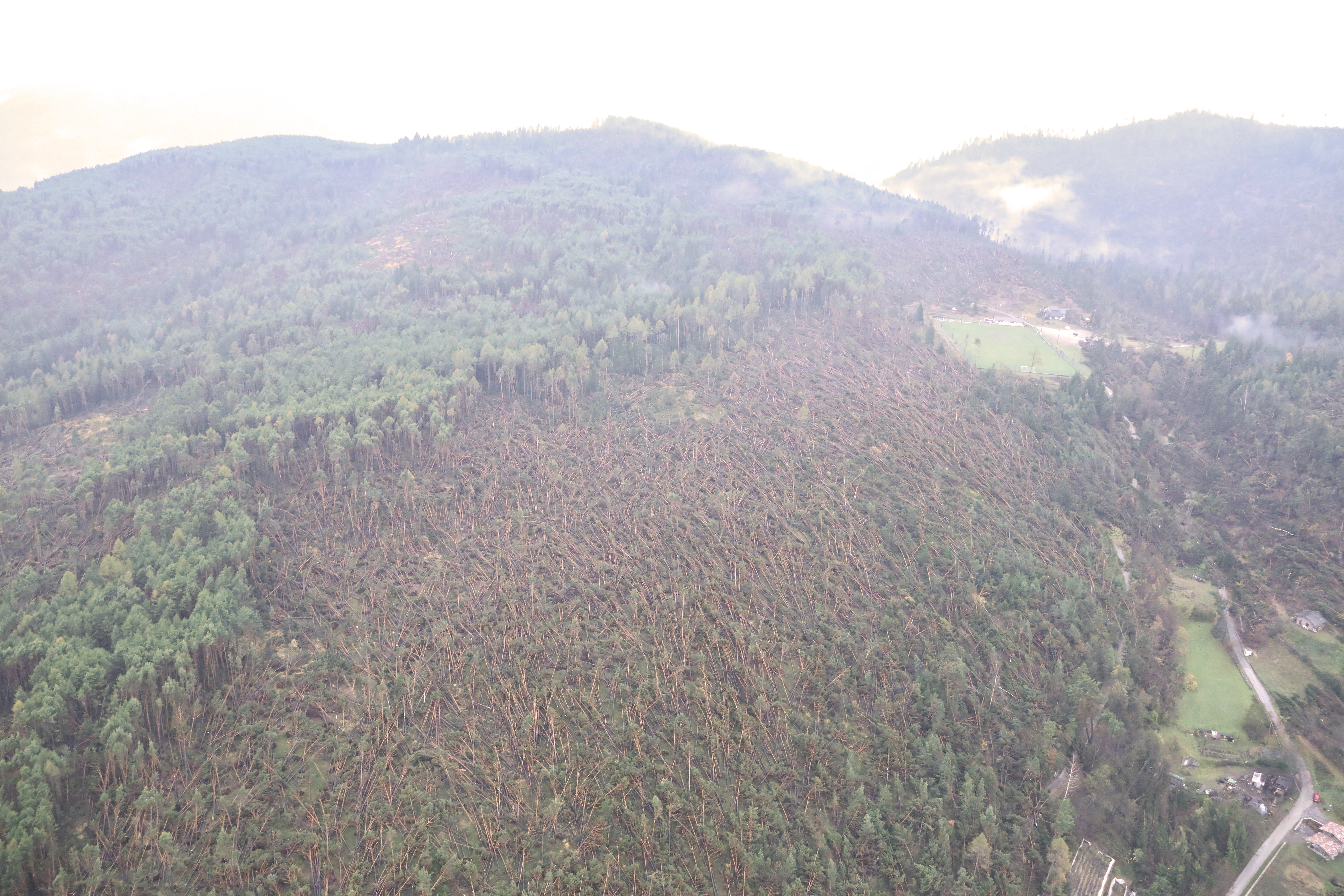 Trentino